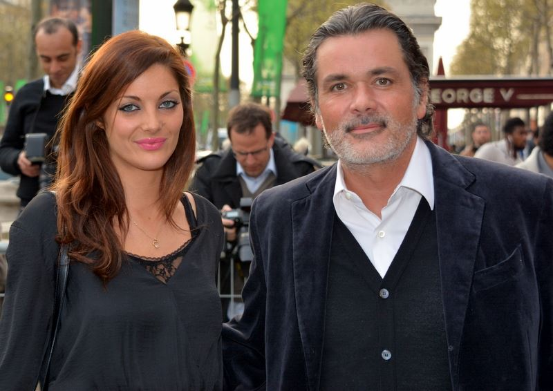 Christophe Barratier et sa compagne Gwendoline à l'avant-première du film "Salaud on t'aime"